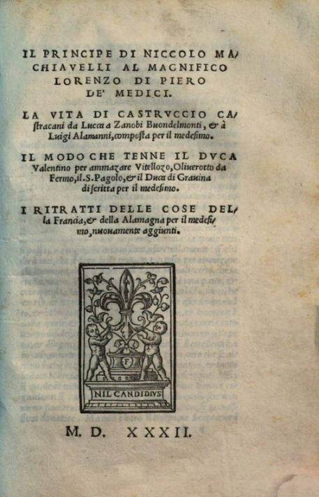 Machiavelli's Il principe, 1532 edition, title page